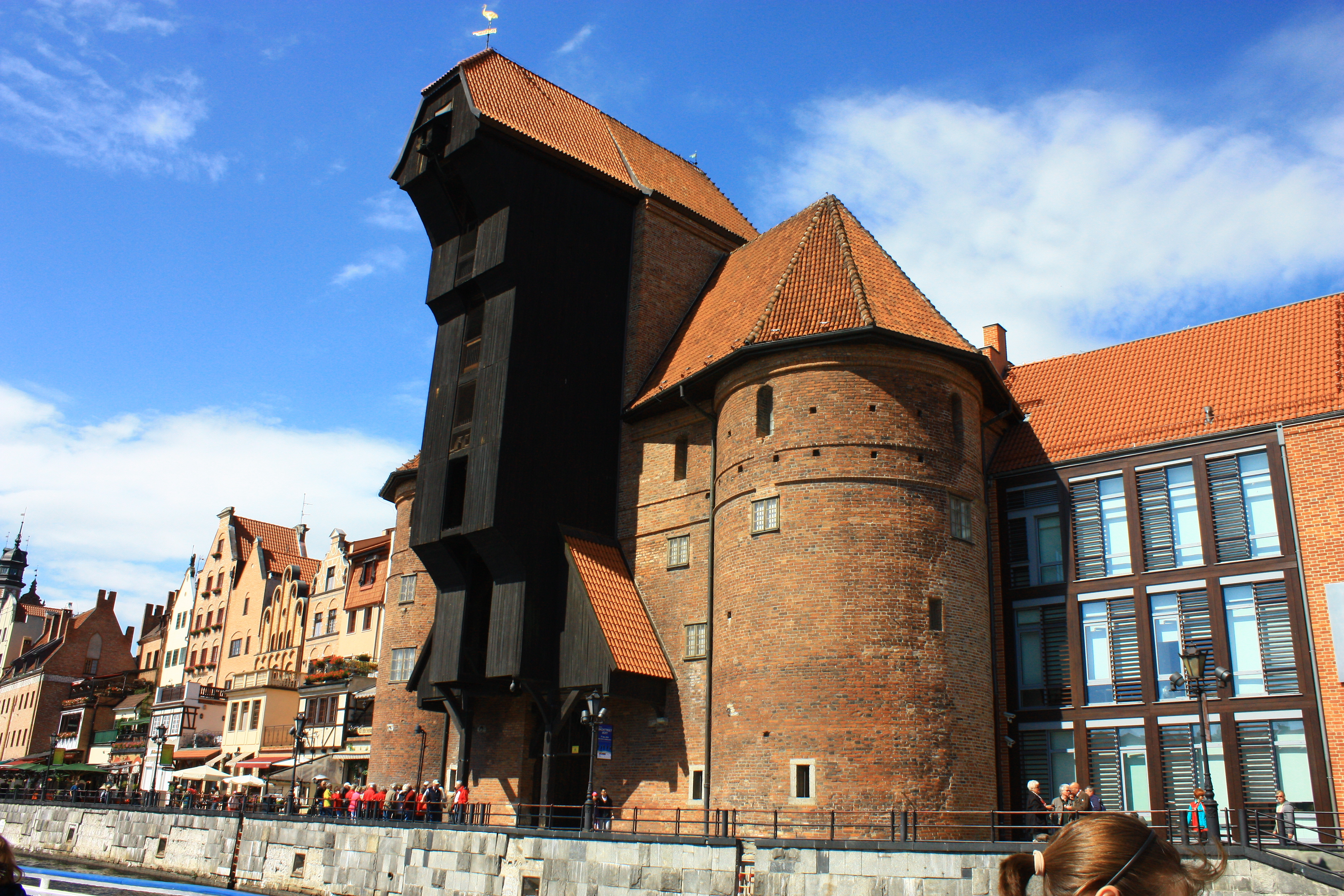 Gdańsk Główne Miasto - Brama Żuraw, XIV, XVII (widok od Motławy)